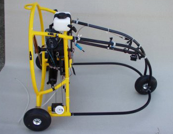 Drone Pixy utilisé par Aerofilmphoto Services